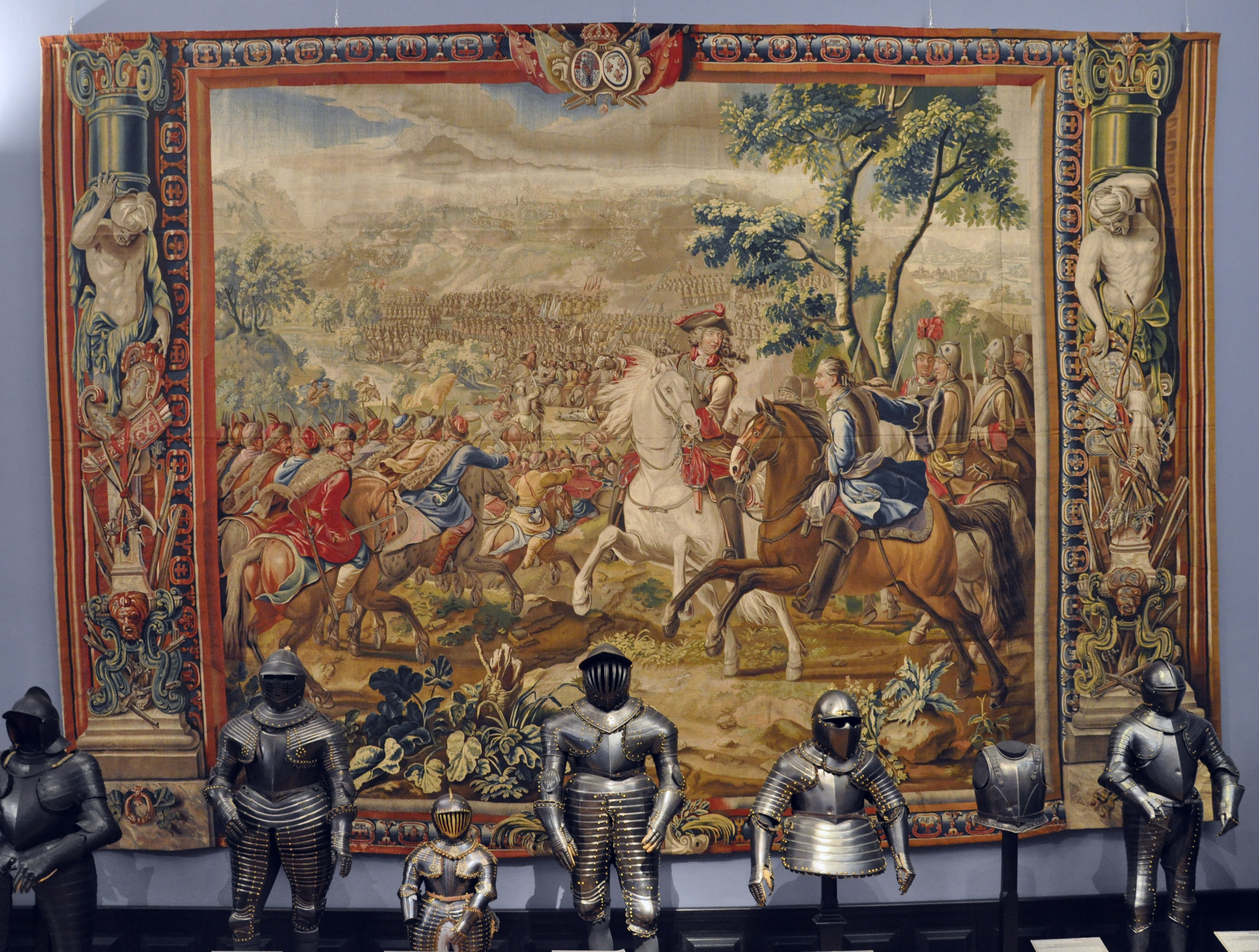 Wien, Kunsthistorisches Museum, Hofjagd- und Rüstkammer (Neue Burg) Gobelin mit lothringischem Wappen